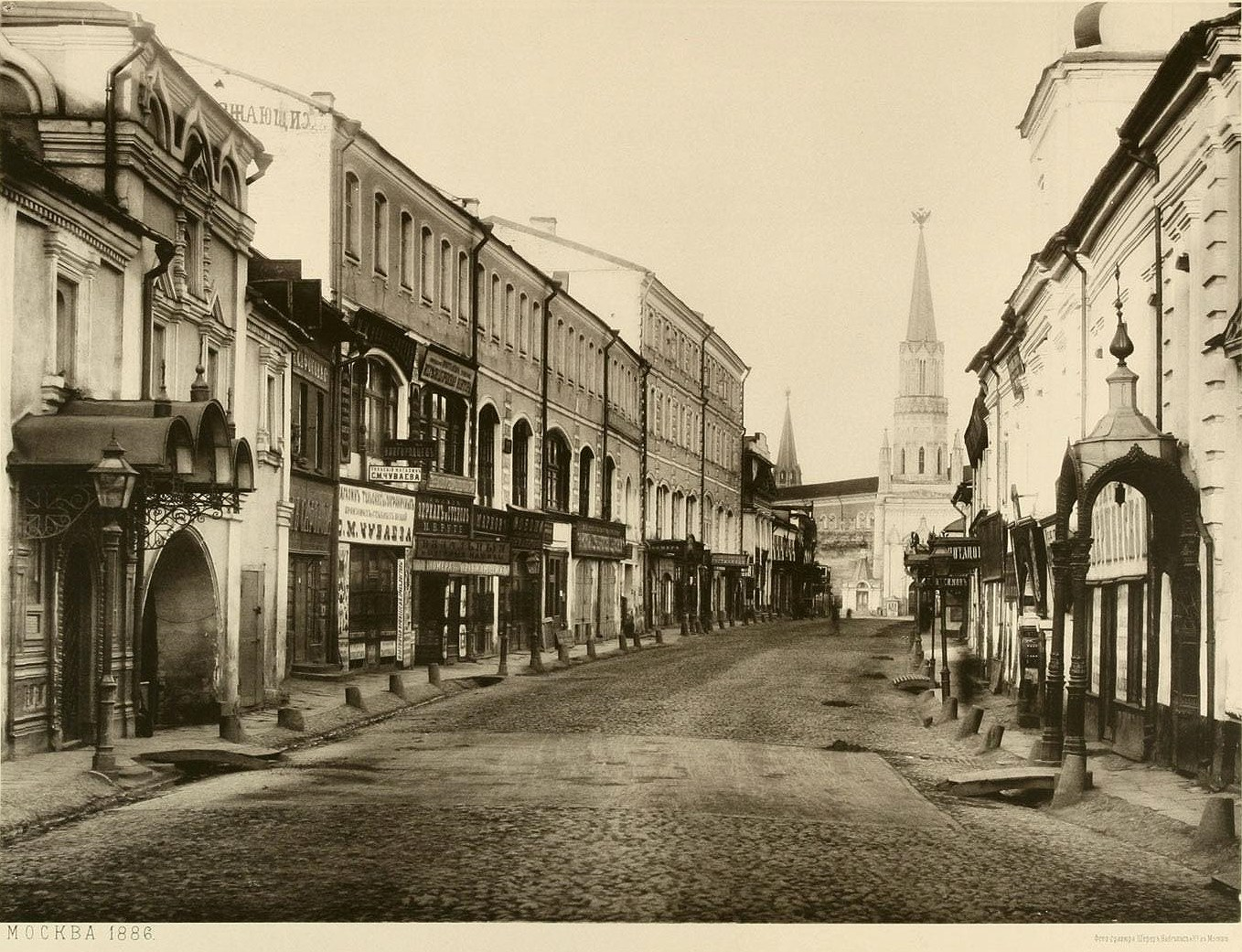 Надвратная ц. Рождества Иоанна Предтечи (слева) Богоявленского монастыря. Никольская улица. XVII век.